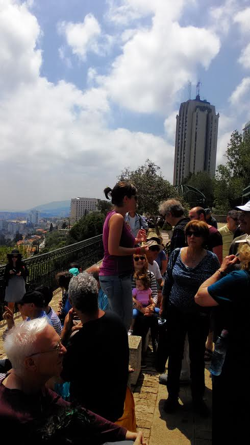 סיור הליכות ג'יין בנושא עיצוב אורבני בחיפה